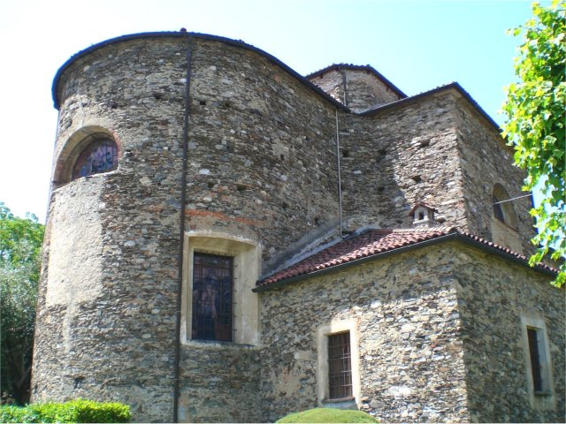 chiesa di San Rocco